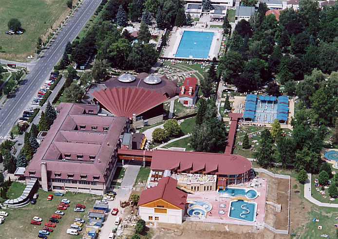 Zalakaros, Hungary, aerialphotography